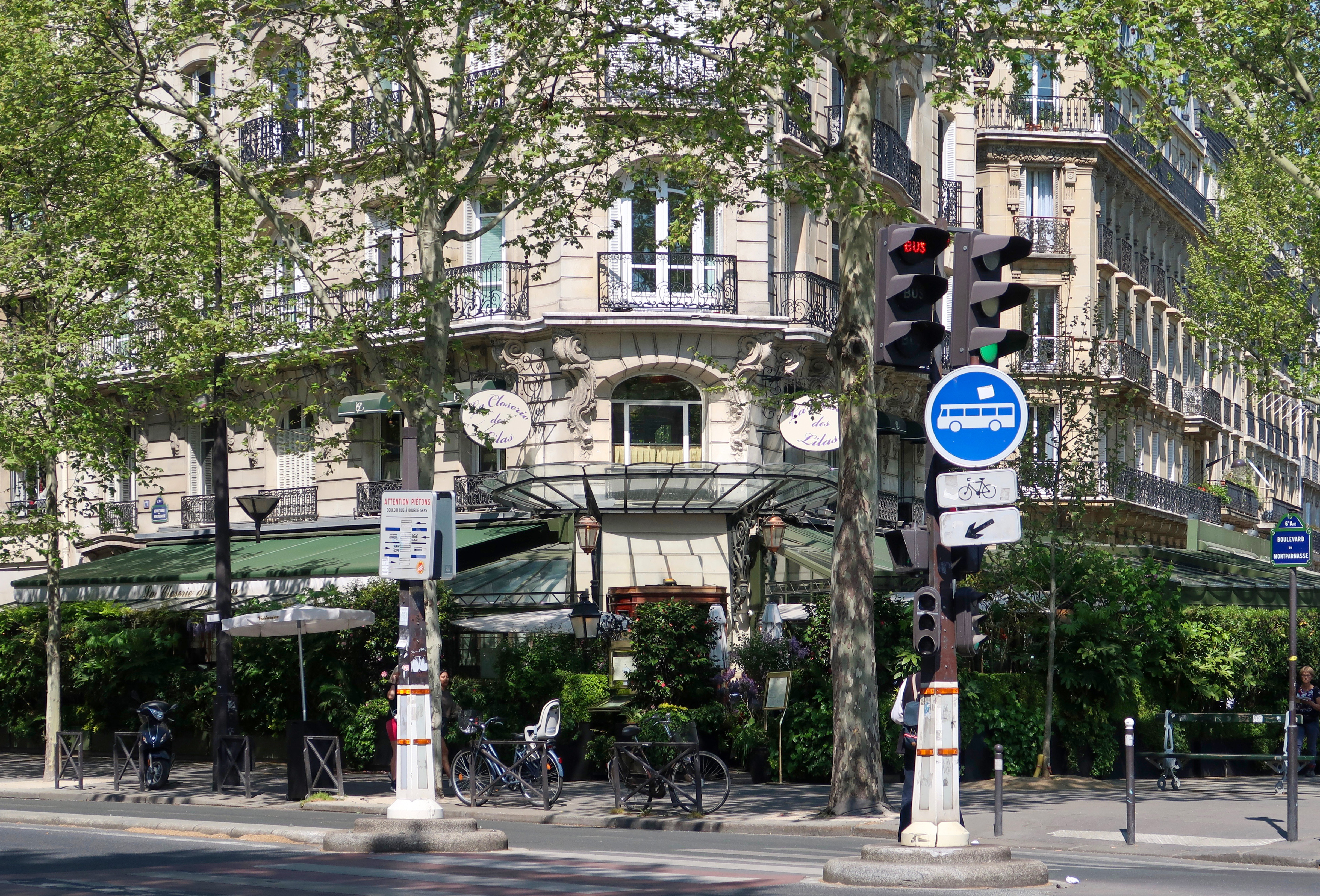 La Closerie des Lilas, 171 boulevard du Montparnasse (Paris, 6e).